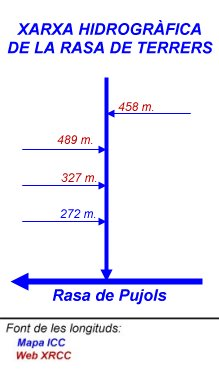 Mapa esquemàtic de la xarxa hidrogràfica de la Rasa de Terrers, al Solsonès.